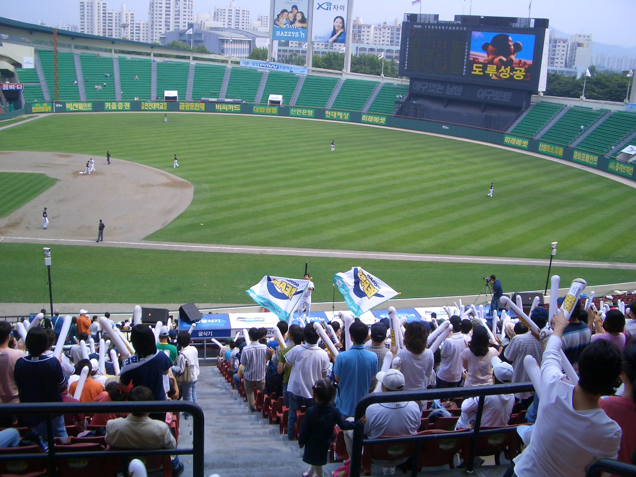 2006年6月13日 (火) 00:51 . . Whiz . . 1280×960 (635,750 バイト)